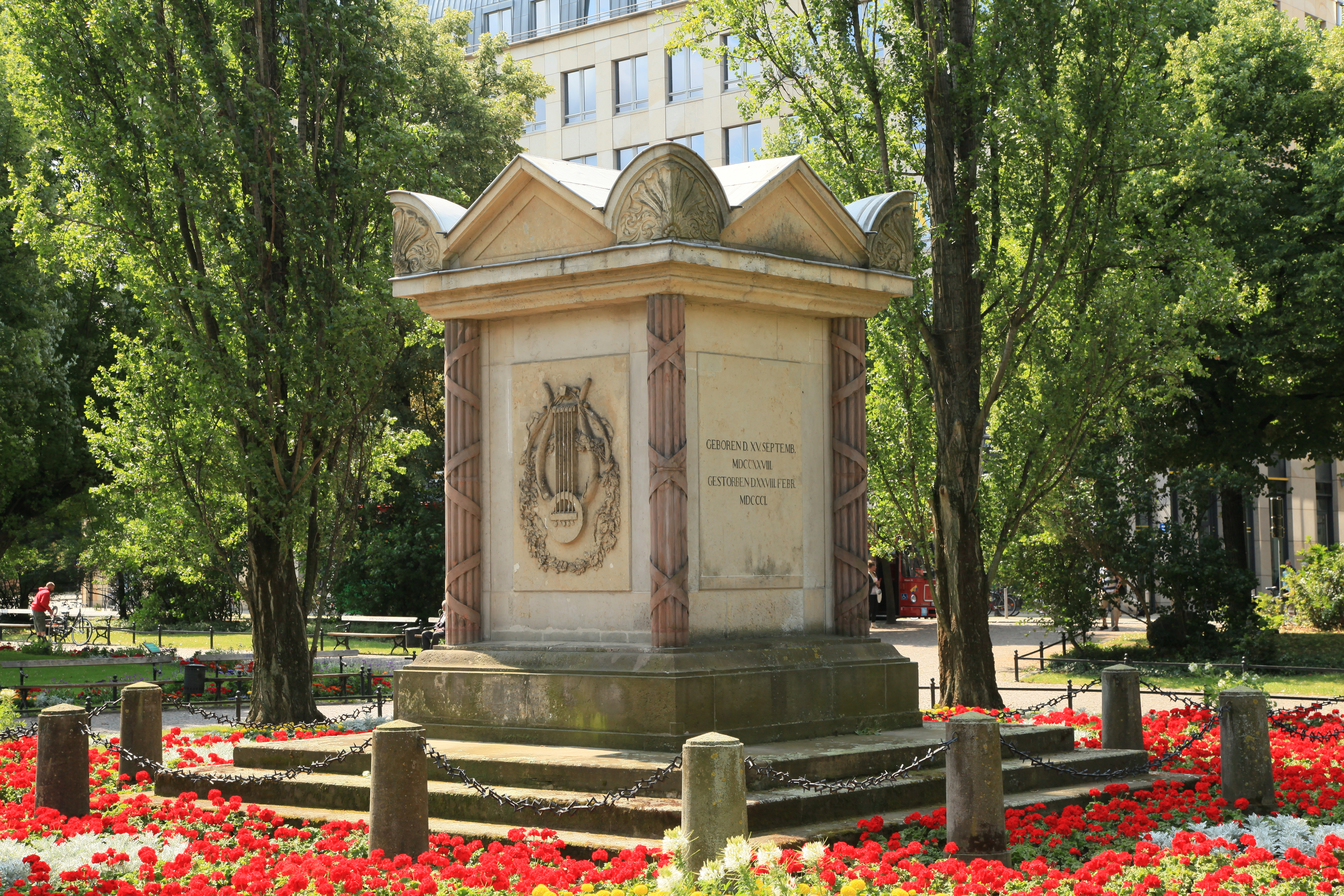 Carl-Wilhelm-Müller-Denkmal, Müllerpark in Leipzig